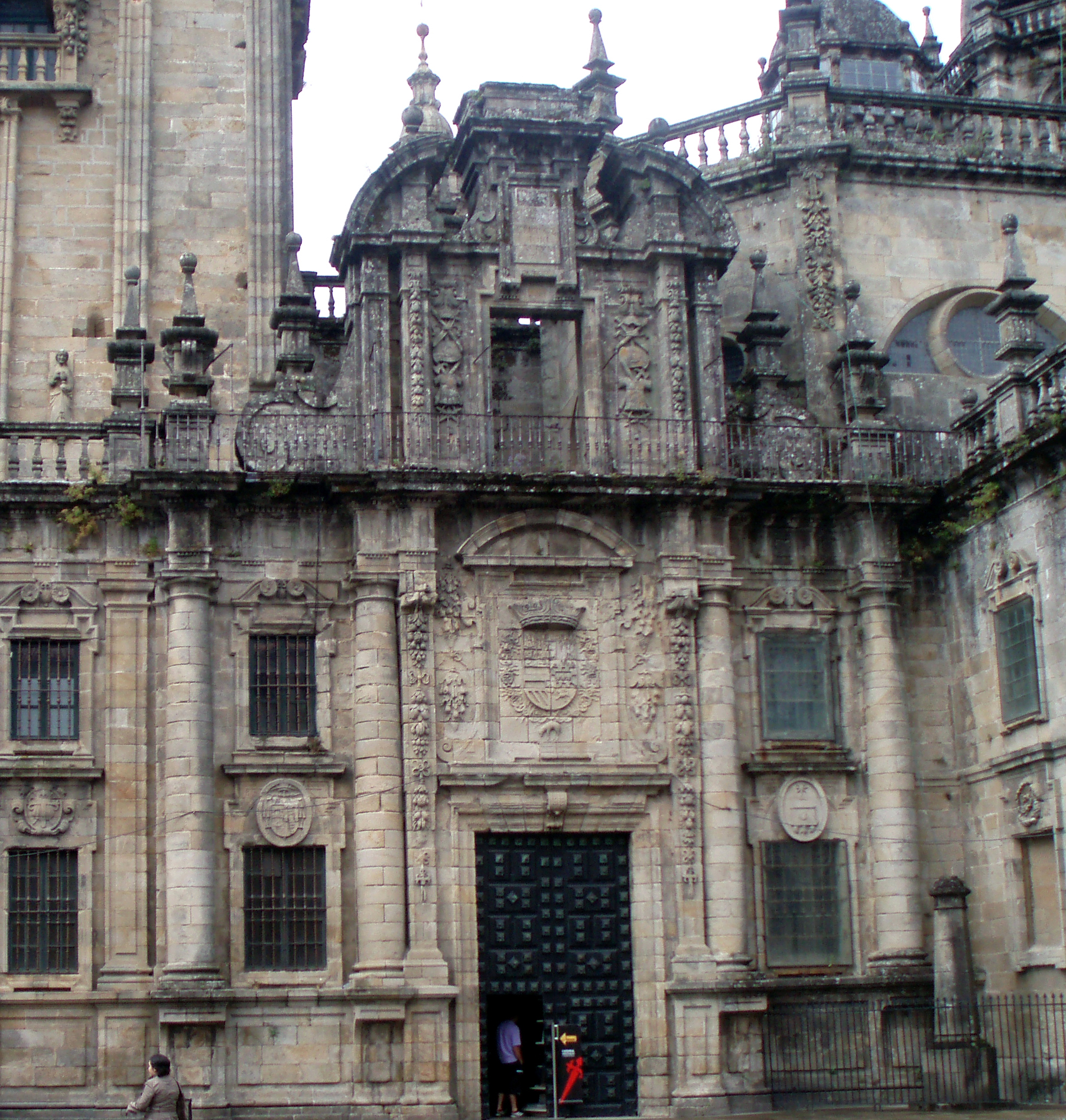 Porta Reial de la catedral de Santiago de Compostel·la